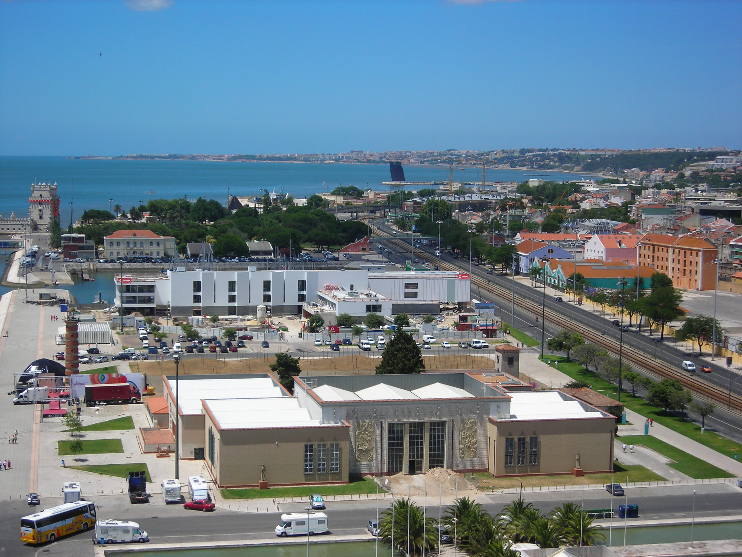 View from Padrão dos Descobrimentos